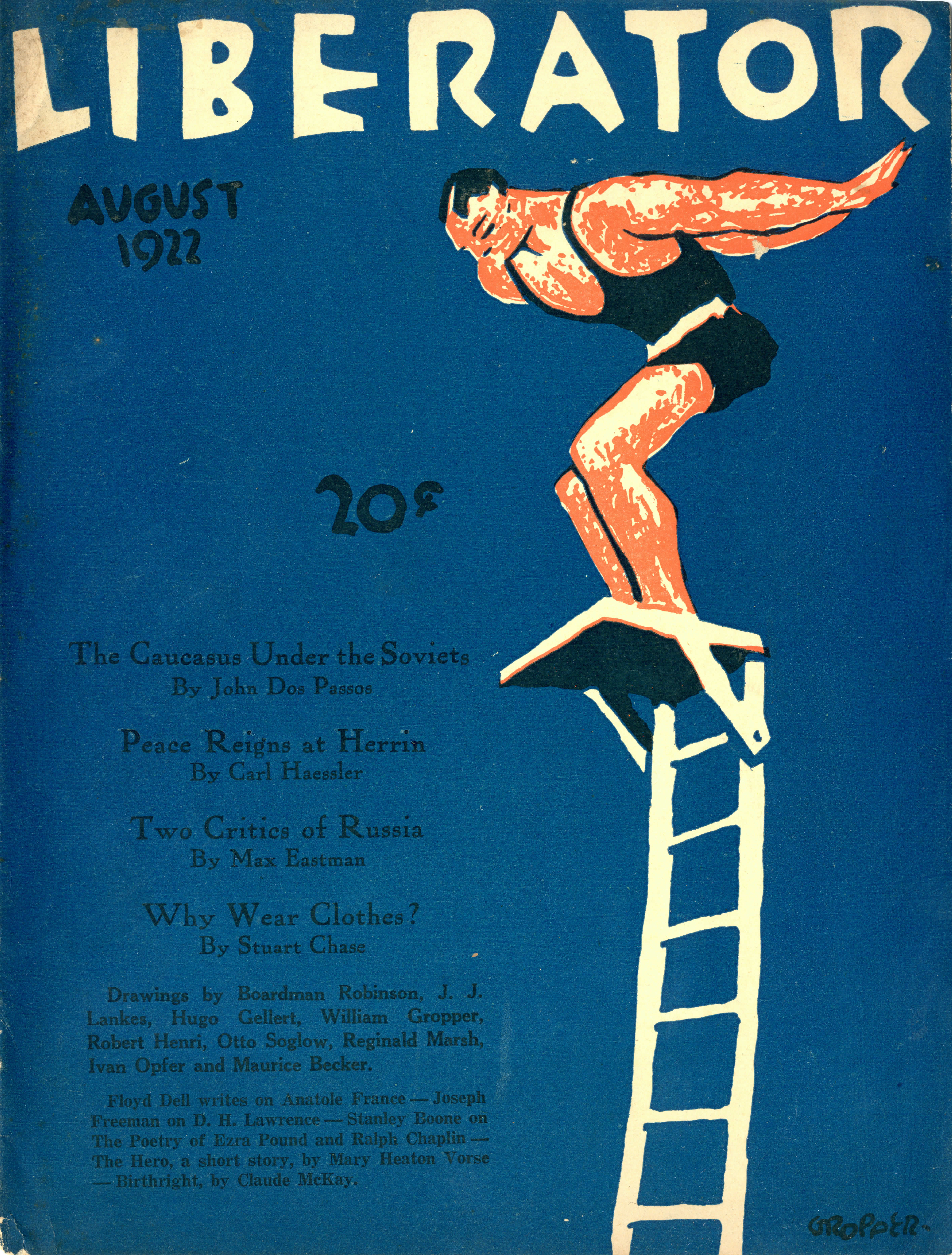 Portada del número de agosto de 1922 de The Liberator.